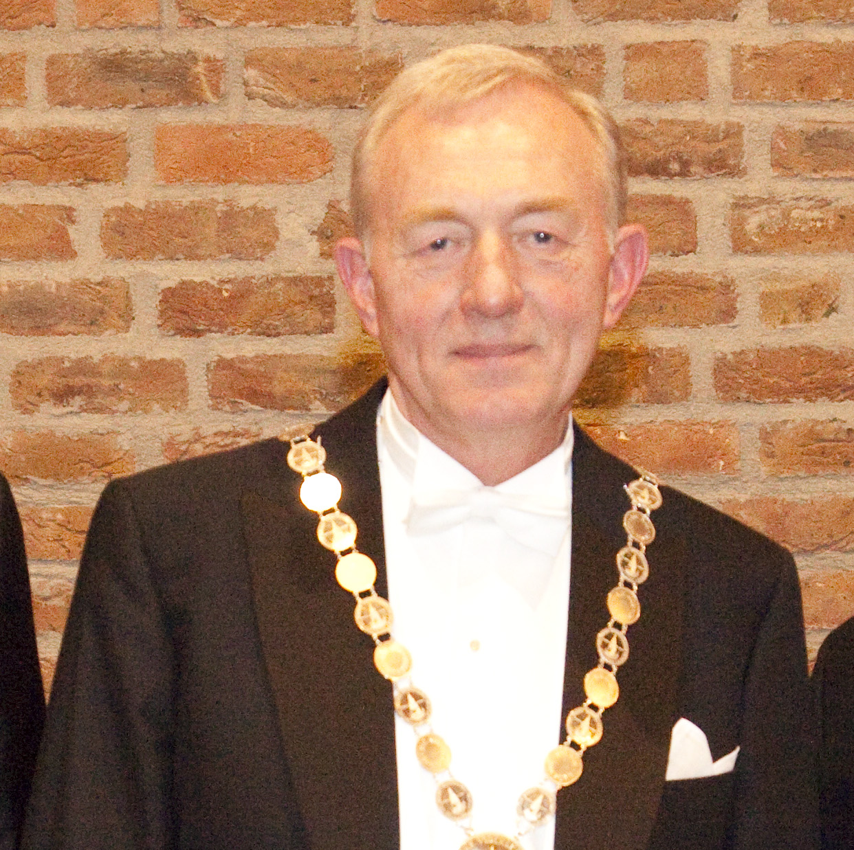 Kristian Fossheim,. Foto: Bruce Sampson / NTNU Vitenskapsmuseet.